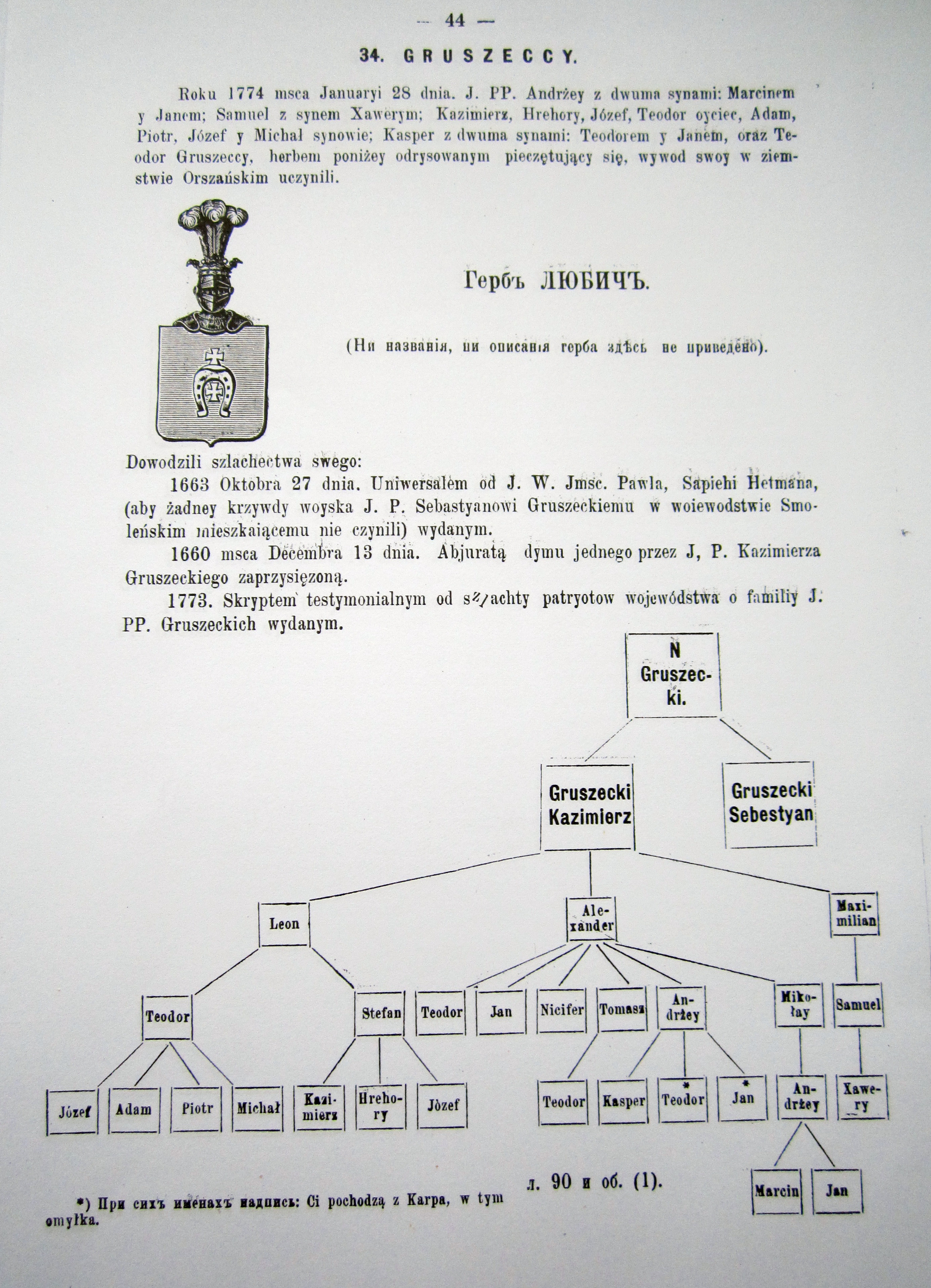 Страница из "Оршанского гербовника" (1900 год)